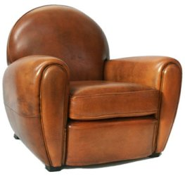 Clubsessel